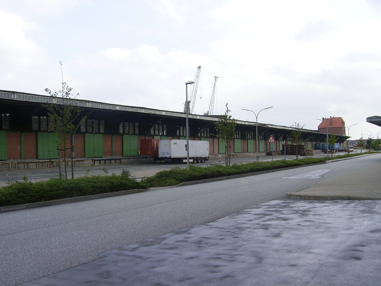 Schuppen 50 am Bremer Kai in Kleiner Grasbrook, erbaut 1908 bis 1912. Der Schuppen 50 ist neben dem Schuppen 52 am Australiakai der letzte erhaltene Kaischuppen in Holzbauweise im Hamburger Hafengebiet.